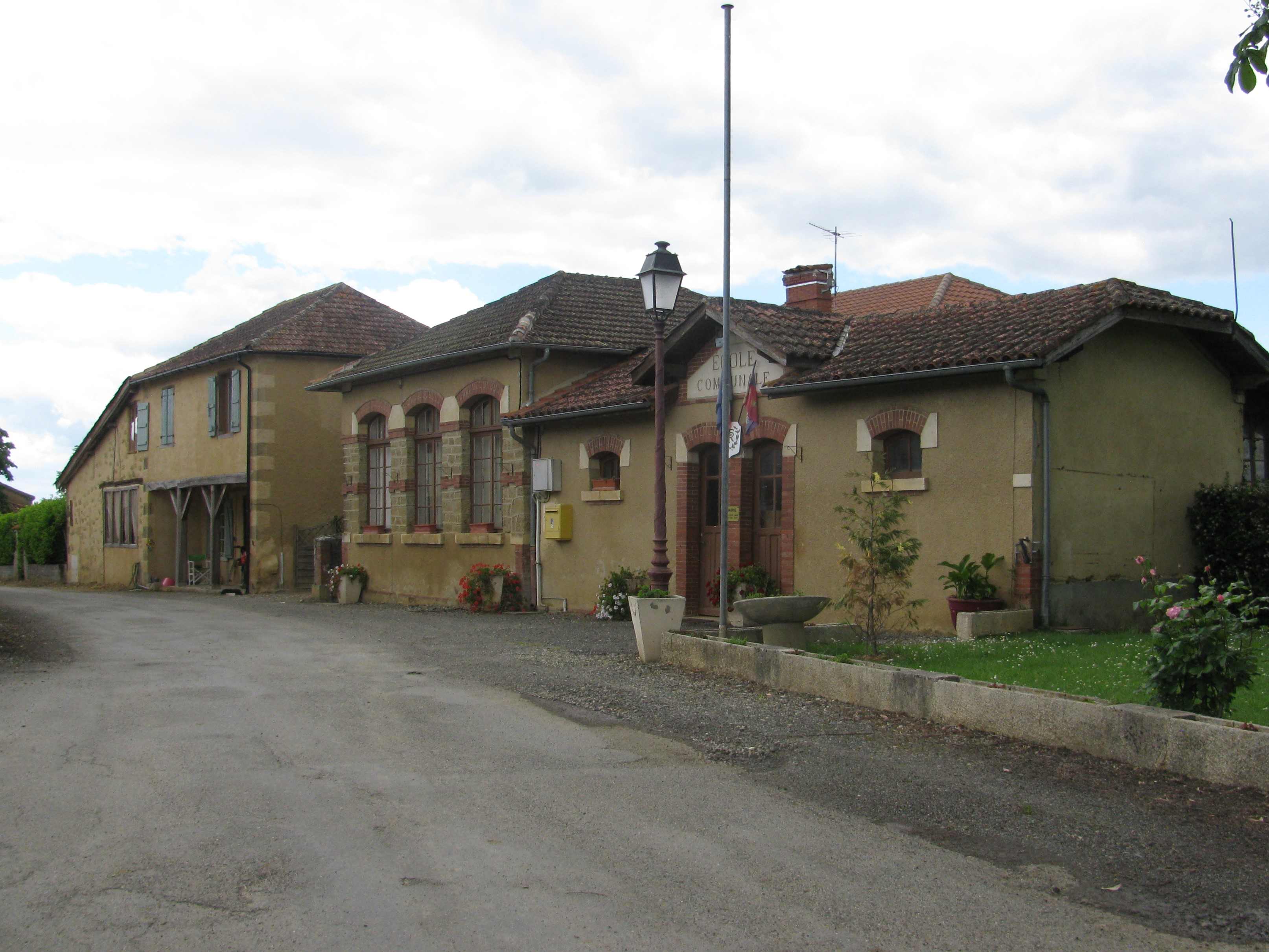 Mairie de Peyrusse Vieille